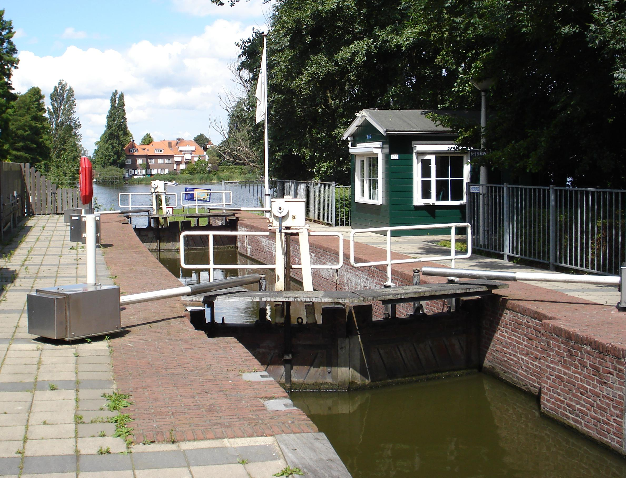 Rotterdam, Rechter Rottekade. Sluis. Rijksmonument.